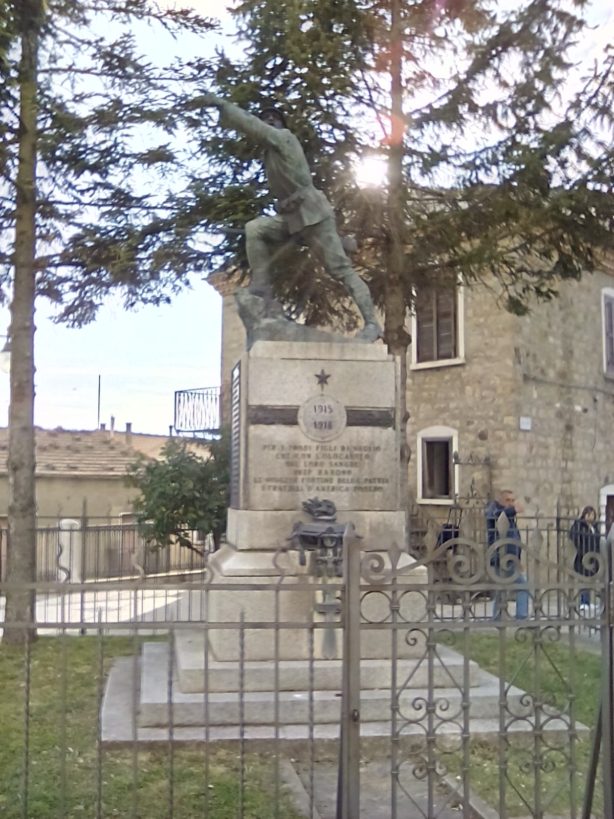 Monumento ai Caduti di Vaglio Basilicata